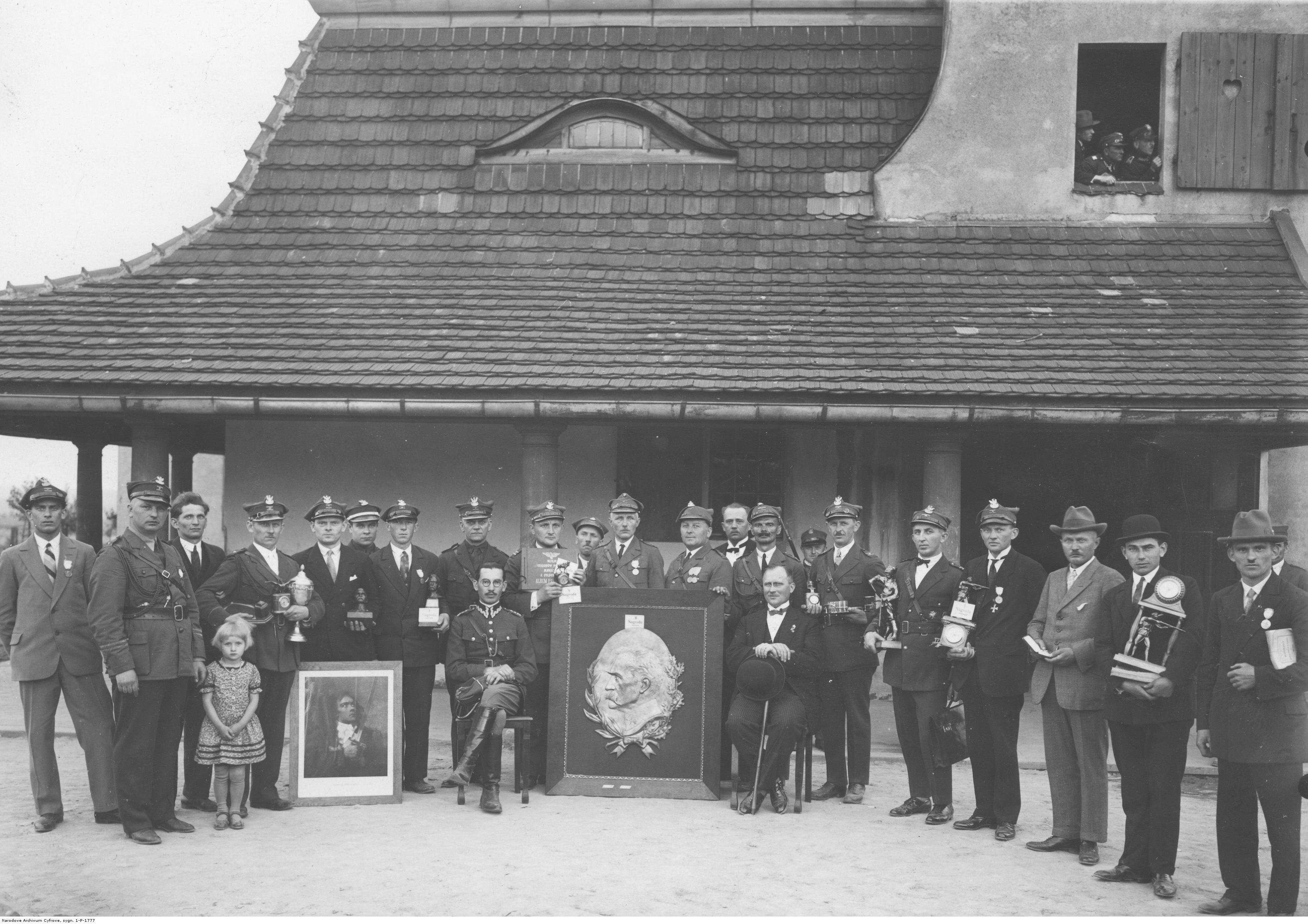 Zawody strzeleckie zorganizowane przez Ogólny Związek Podoficerów Rezerwy RP w Katowicach. Grupa uczestników z nagrodami. Widoczni m.in.: porucznik Stefański z 73 Pułku Piechoty i prezes Przybyła (siedzą na krzesłach). Koncern Ilustrowany Kurier Codzienny - Archiwum Ilustracji. Sygnatura: 1-P-1777